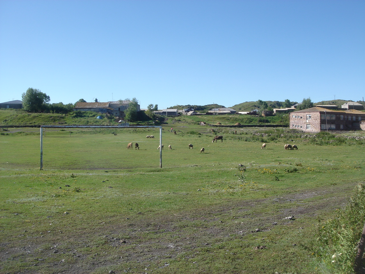 Description Vue du stade de foot du village de Lchap Date25 December 2009Sourcephotographie personnelle à l'auteurAuthorFranck Devedjian franckdevedjian(at)hotmail(pt)com Vue du stade de foot du village de Lchap